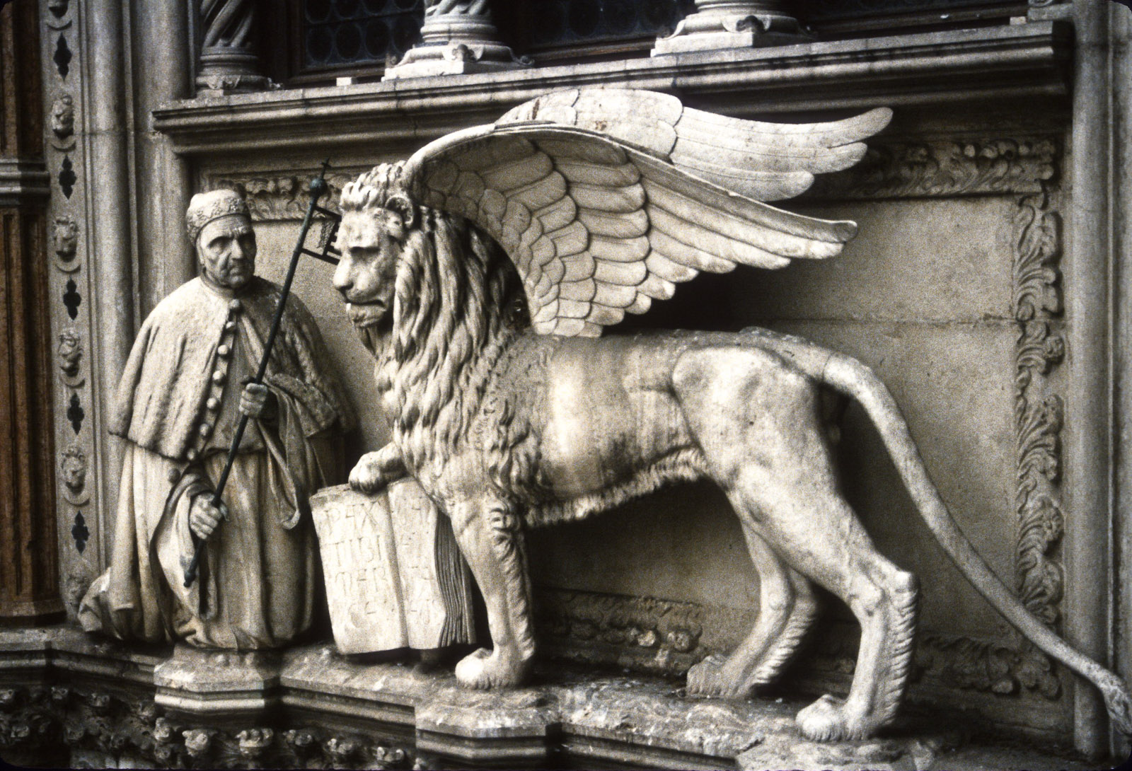 Doge Francesco Foscari on the Porta della Carta at the Doge's Palace, Venice.